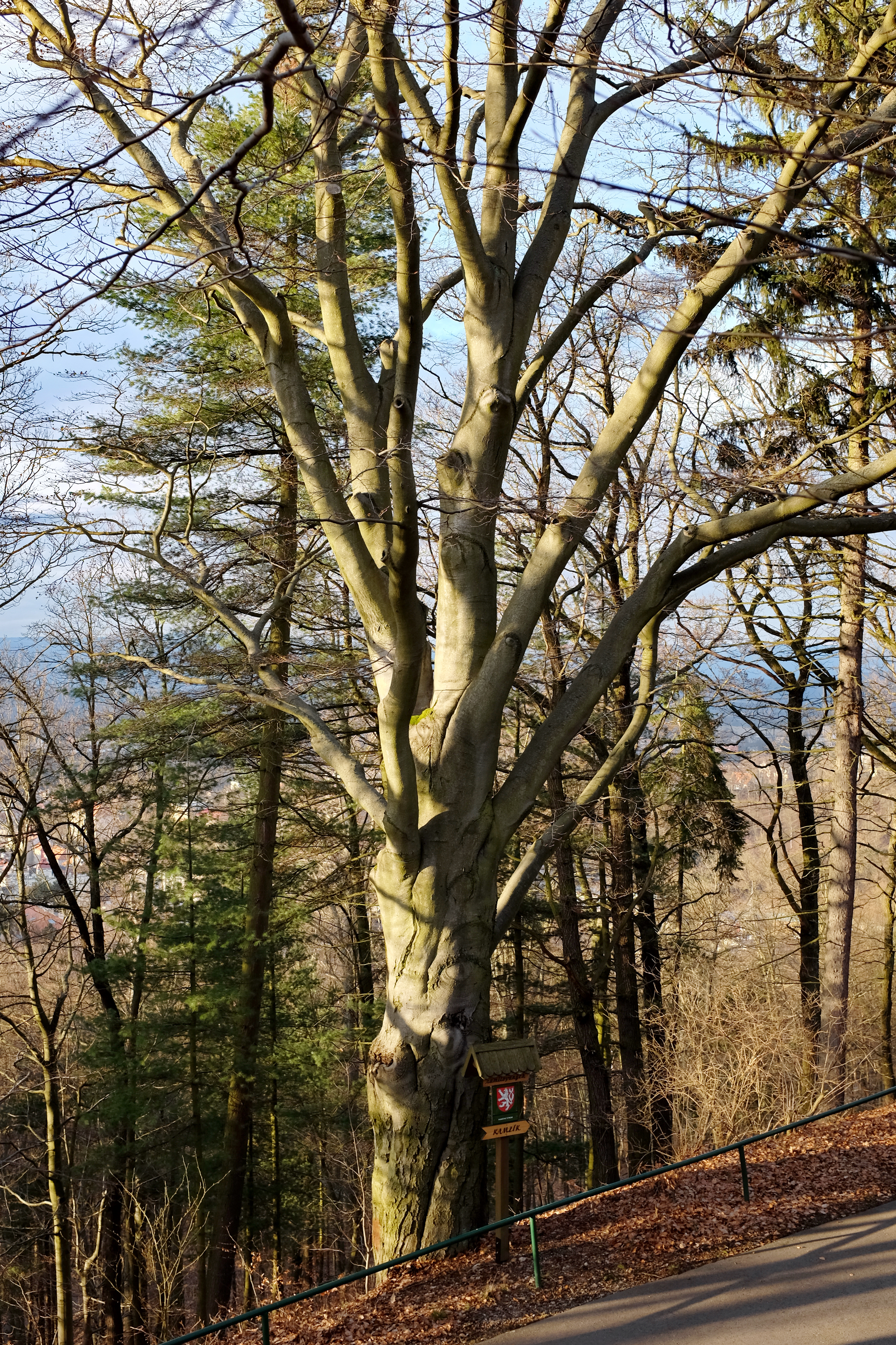 Památný strom - Buk zamilovaných - Karlovy Vary